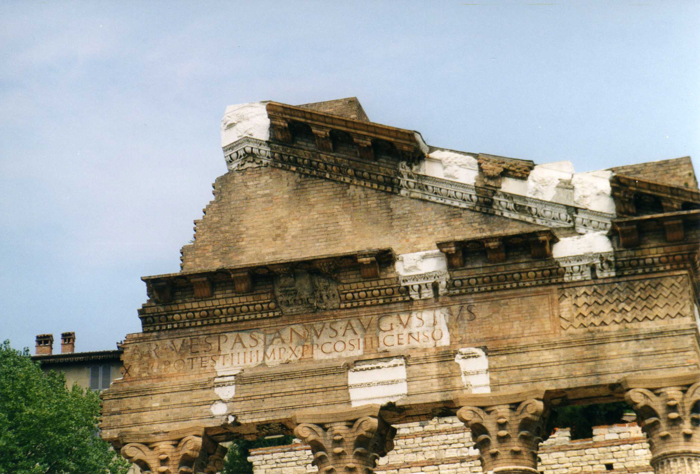 Particolare del settore restaurato del Tempio Capitolino a Brescia, nell'ex Foro Romano. Autore: Giorces.